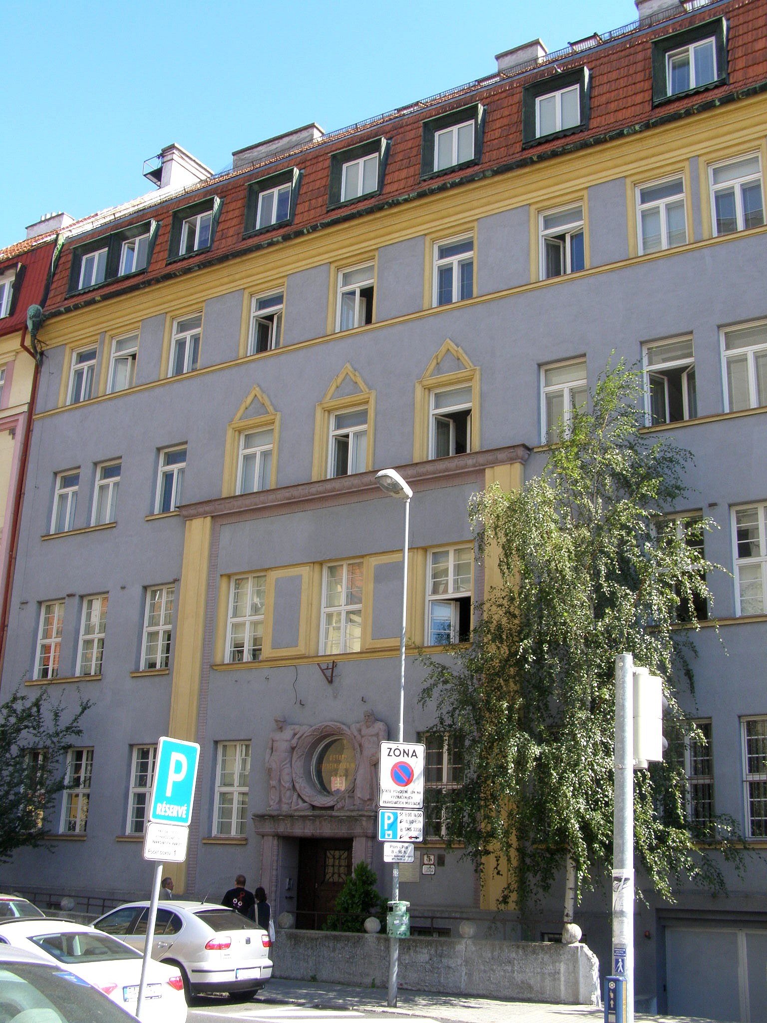 Klemensova ul. č. 19. Sídlo Ústavov spoločenských vied SAV Object location48° 08′ 32.28″ N, 17° 07′ 11.28″ E